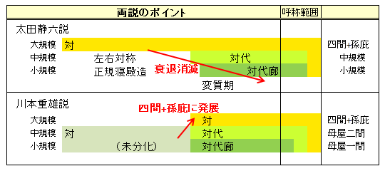 対についての太田・川本両説のポイント